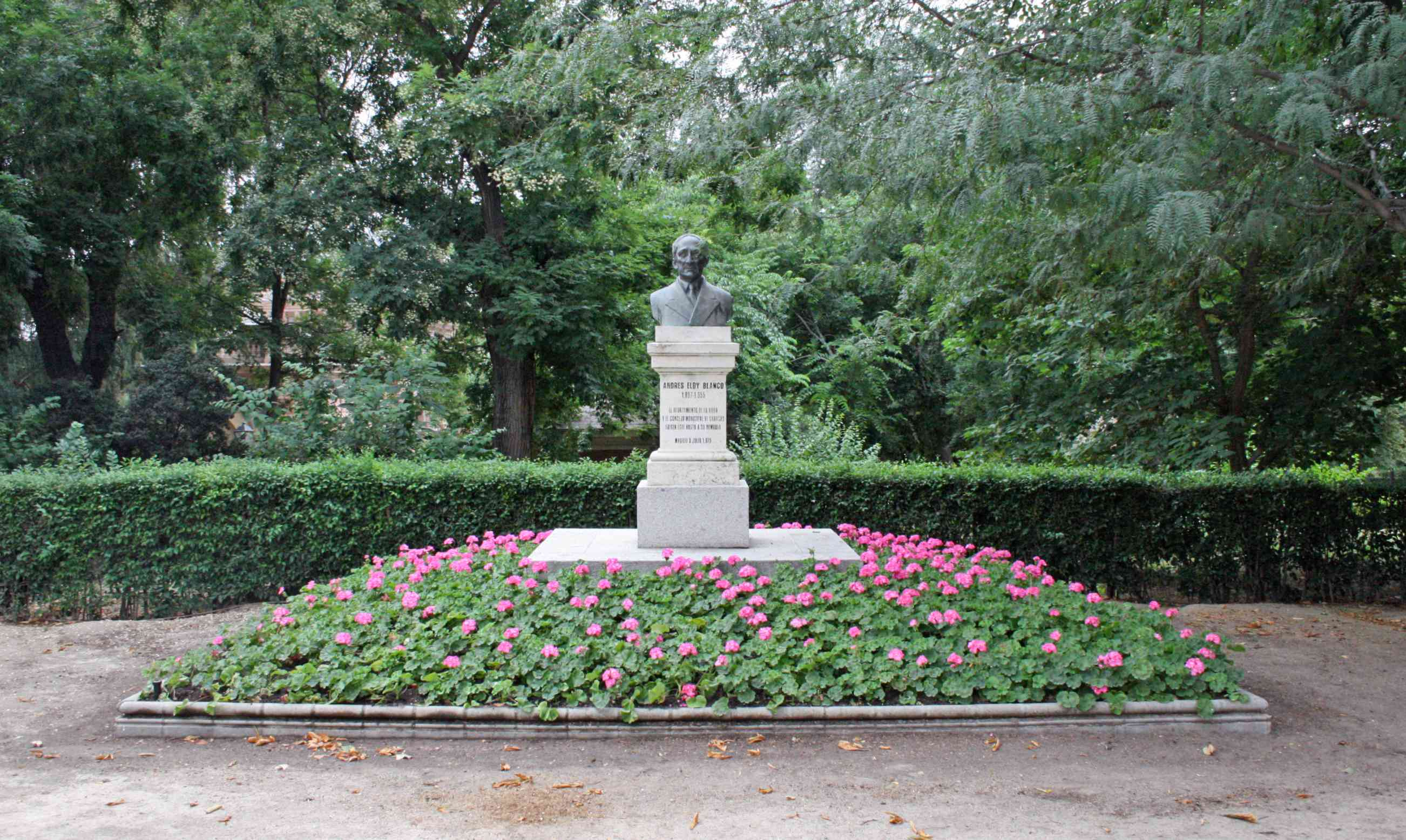 Monumento al venezolano Andrés Eloy Blanco en el Parque del Retiro de Madrid (España). General.